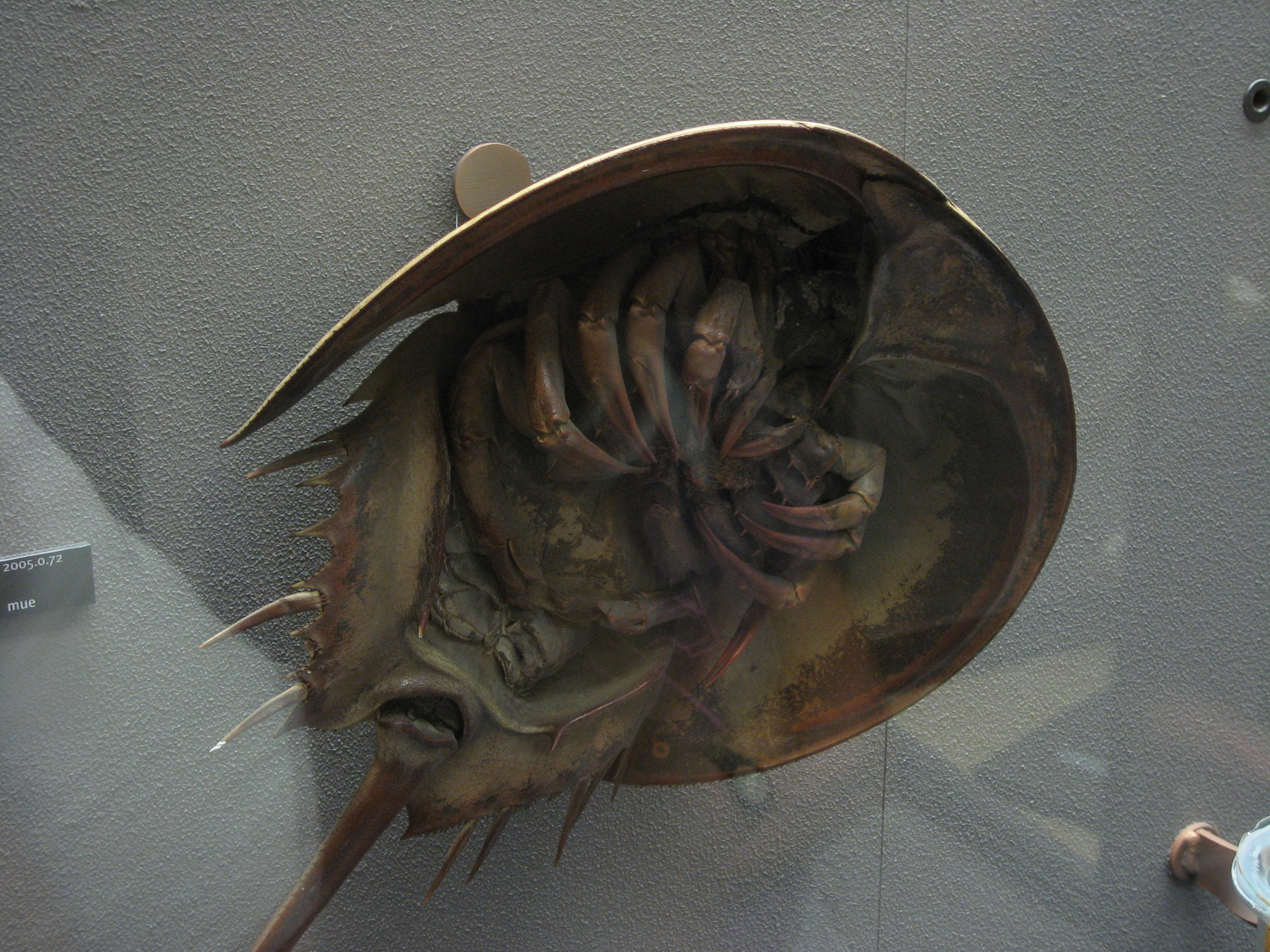 Limulus polyphemus in Muséum-aquarium de Nancy Map: 48° 41' 41" N 6° 11' 18" E